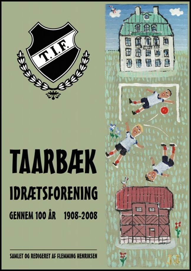 Forsiden på "Taarbæk Idrætsforening - gennem 100 år". Skrevet og redigeret af Flemming Henriksen